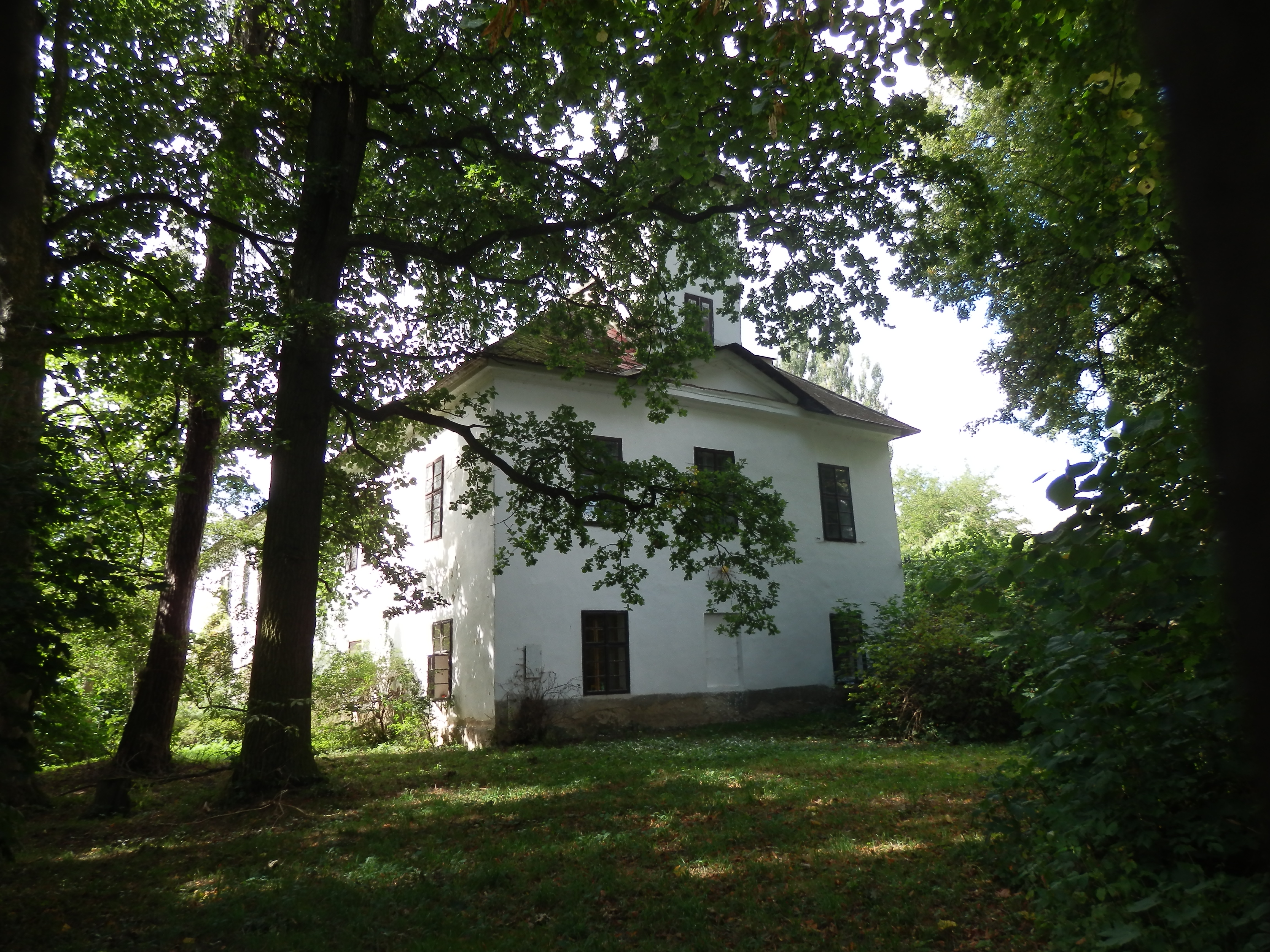 Zámek - zámeček Petrkov, Petrkov 13